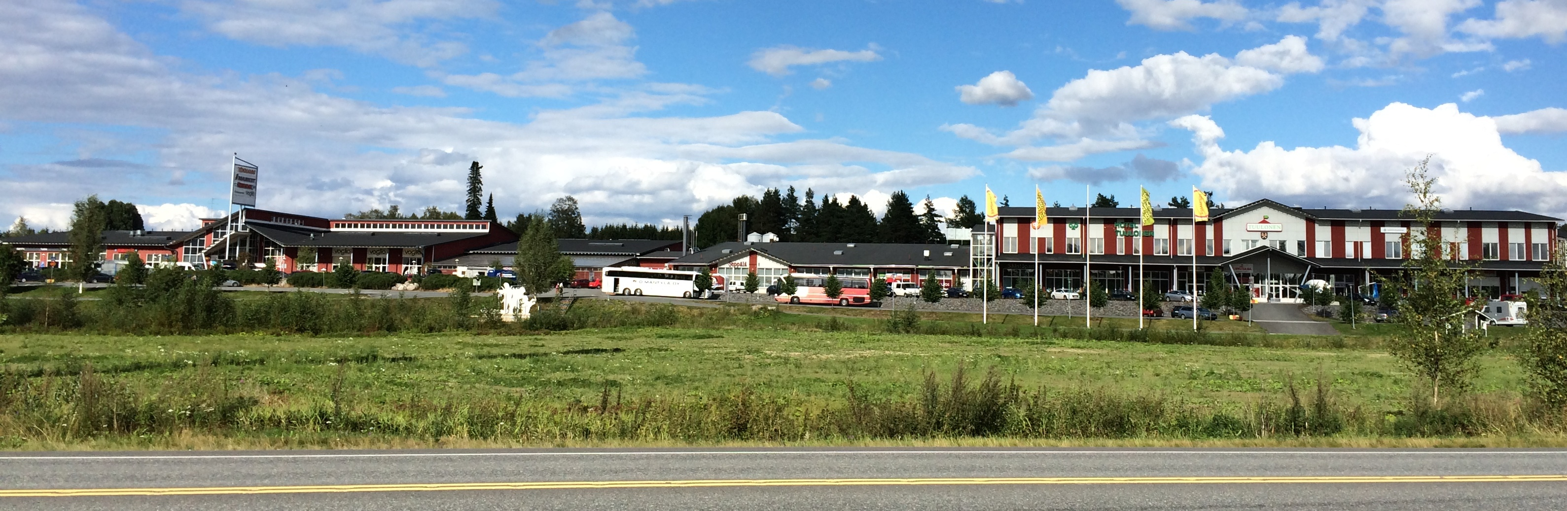 Kauppakeskus Tuulosen rakennus valtatie 12:lta kuvattuna. Vanhempi osa vasemmalla, uusi oikealla.